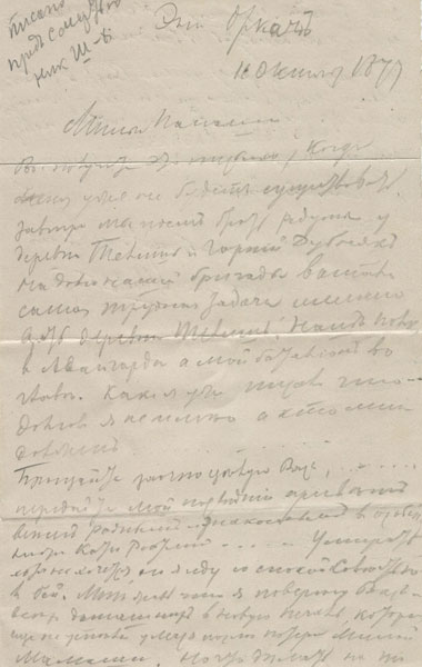 предсмъртното писмо на Шилдбах